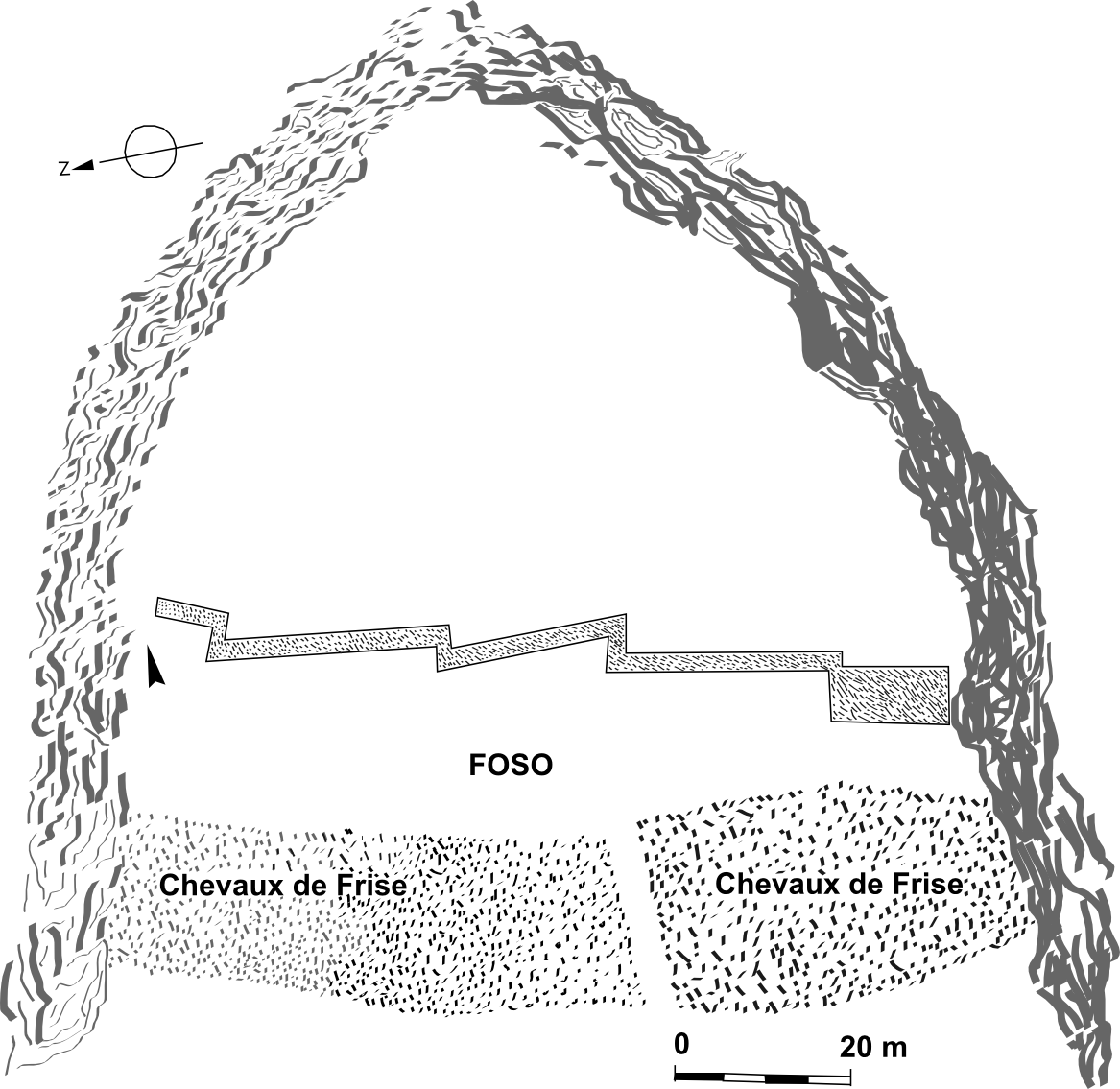 Plano del castro de Castilviejo de Guijosa, provincia de Guadalajara, España.